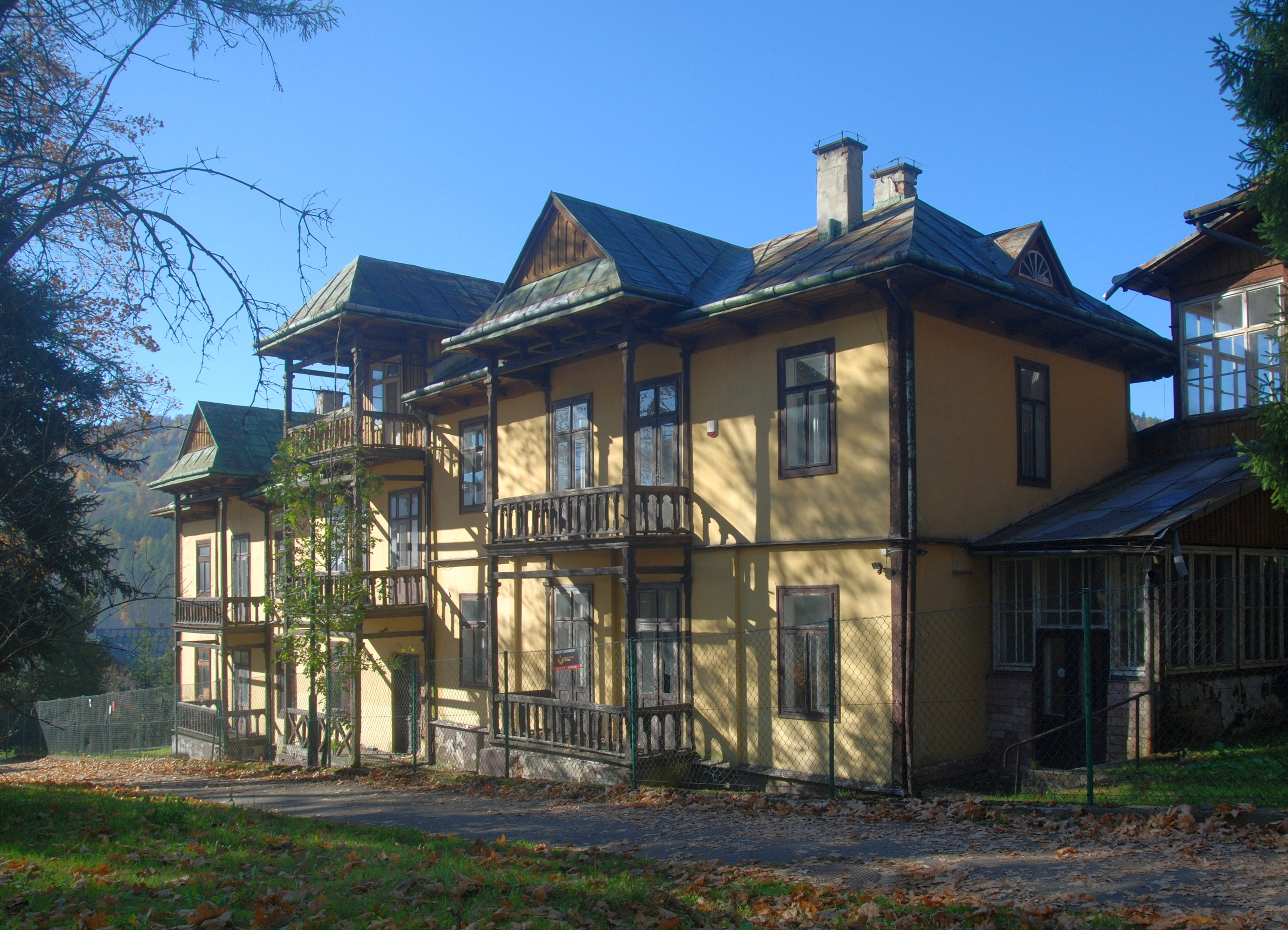 miasto Szczawnica